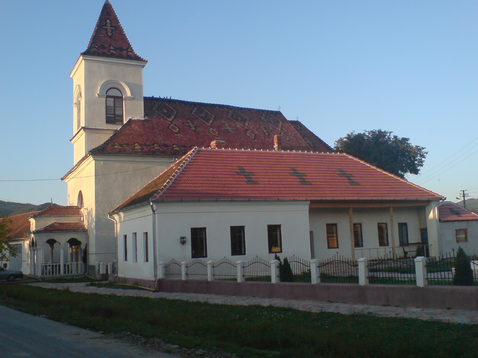 Biserica Ortodoxa din Sibot